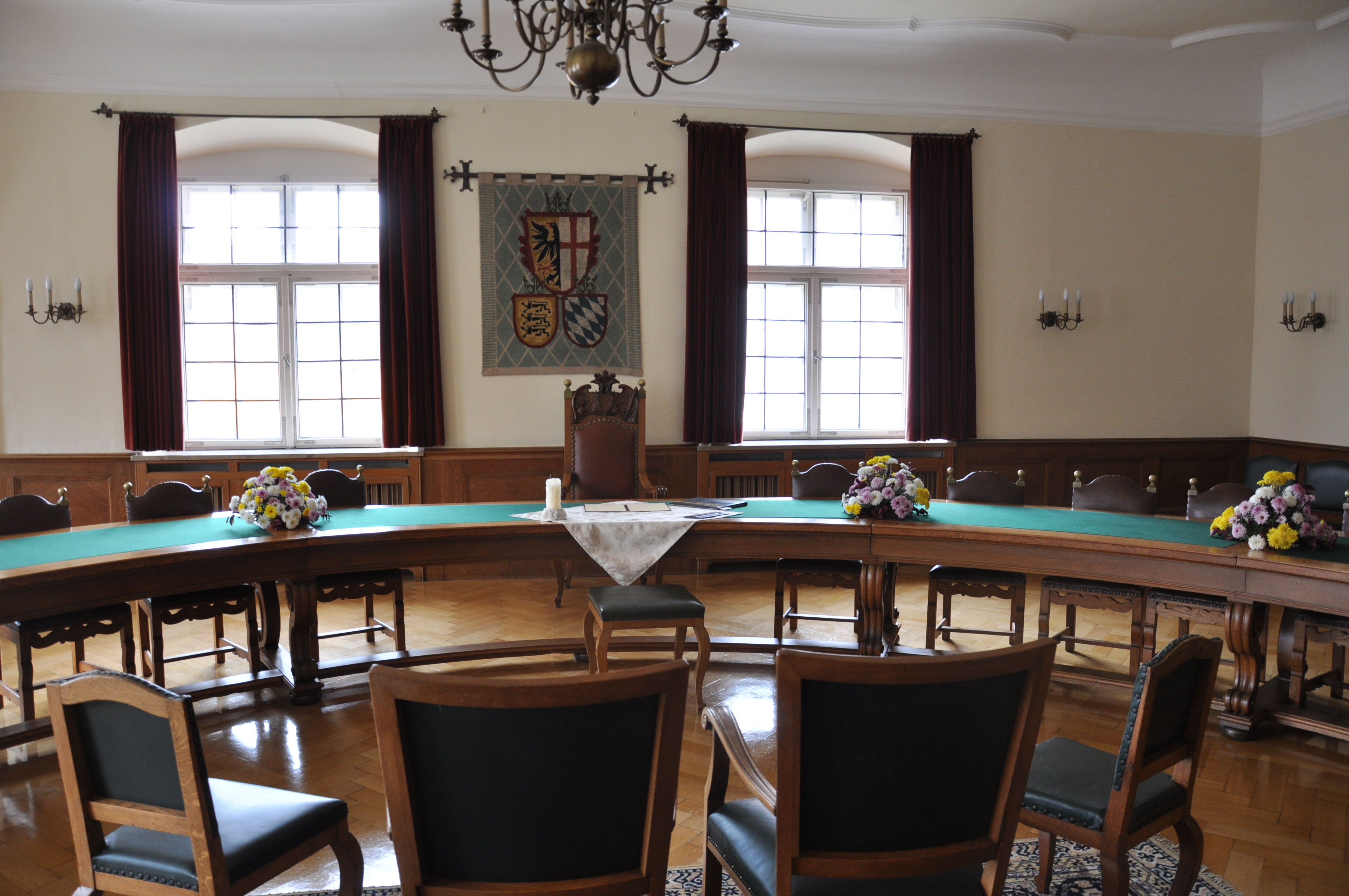 Memmingen, Rathaus, 2. OG, Alter Sitzungssaal (heute Standesamt)